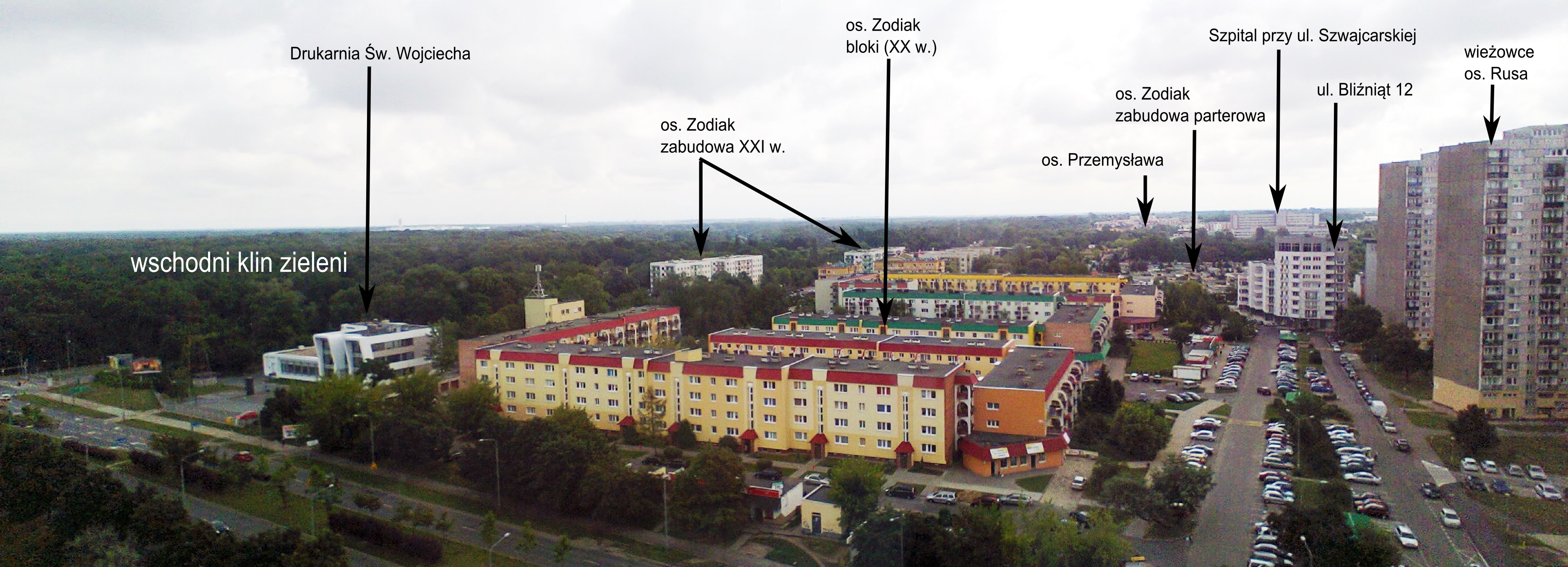 Chartowo - widok na wschodni klin zieleni; Malta, os. Zodiak, os. Rusa, Drukarnia św. Wojciecha, Szpital przy Szwajcarskiej, os. Przemysława